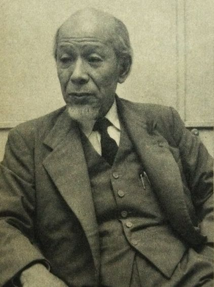 八木秀次